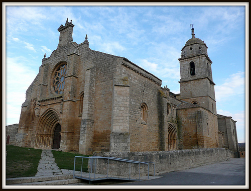 Colegiata de Nuestra Señora del Manzano de Castrojeriz, Provincia de Burgos, España.